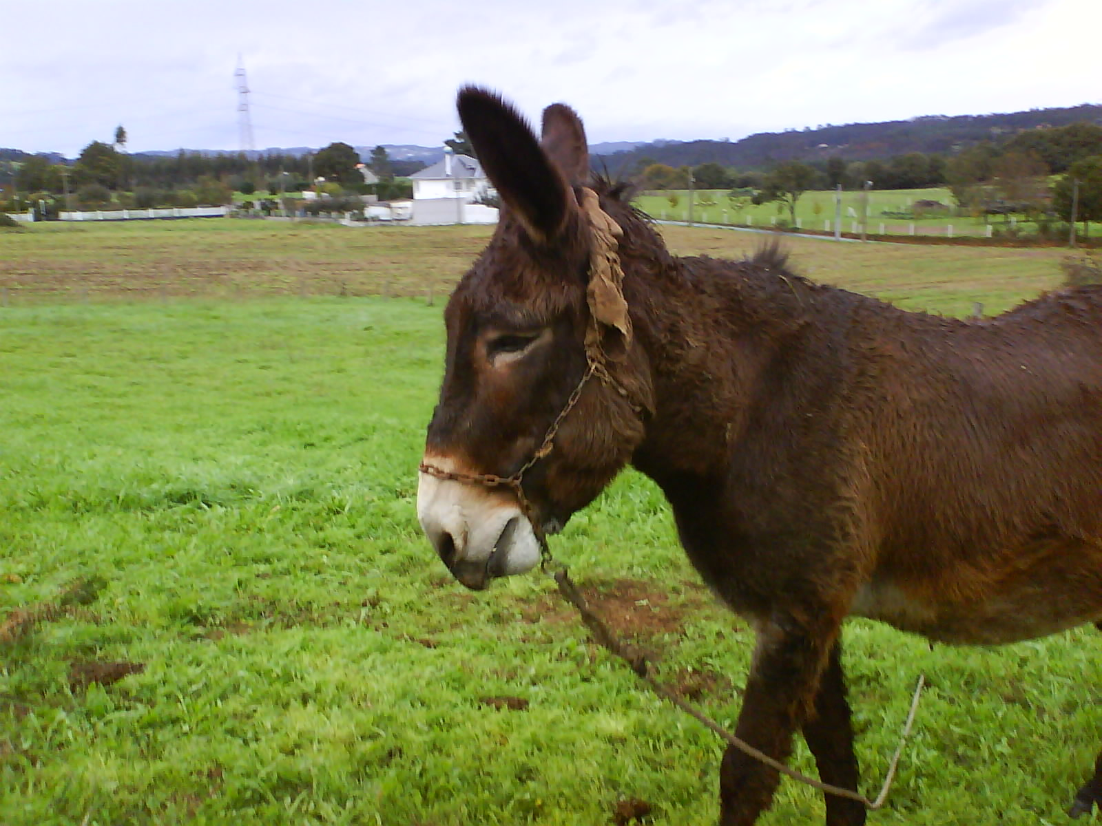 Burro, Galiza'415654935_1ffd7df03d_b.jpg'